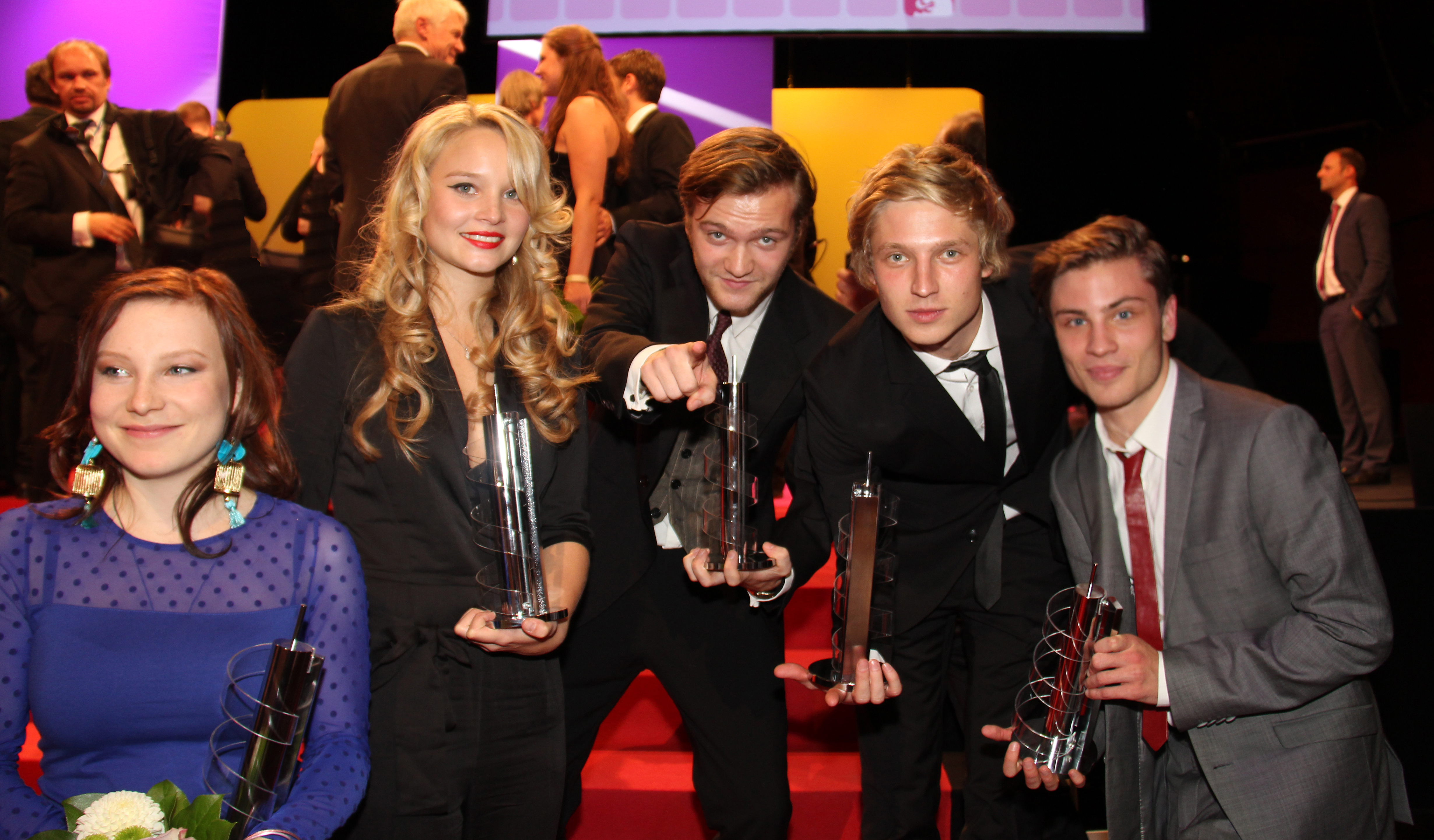 Preisträger des Films Mittlere Reife beim Hessischen Film- und Kinopreis 2012: Isabel Bongard, Sonja Gerhardt, Vincent Redetzki, Anton Rubtsov und Jannik Schümann